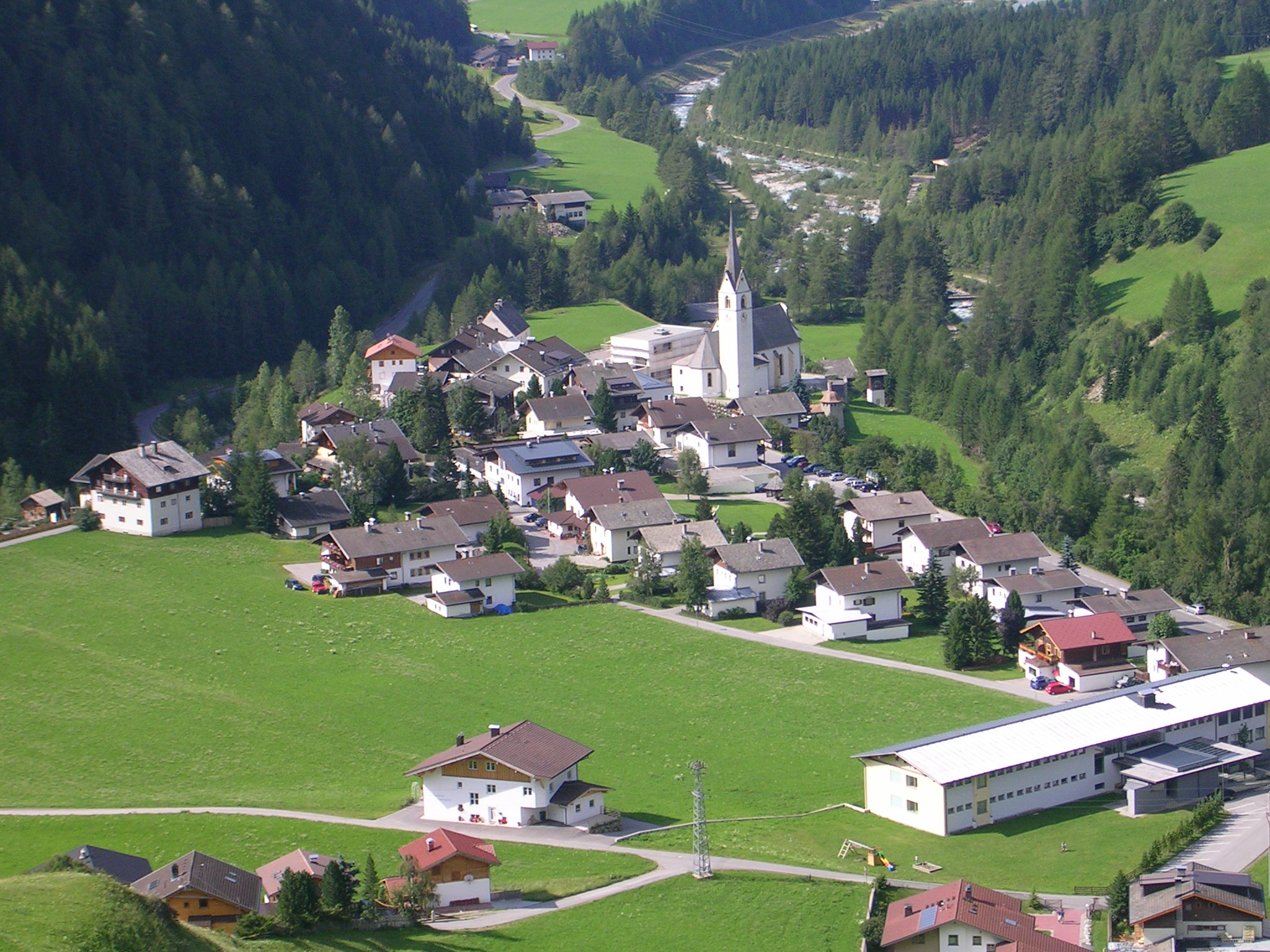 Kals am Großglockner, center/Ködnitz